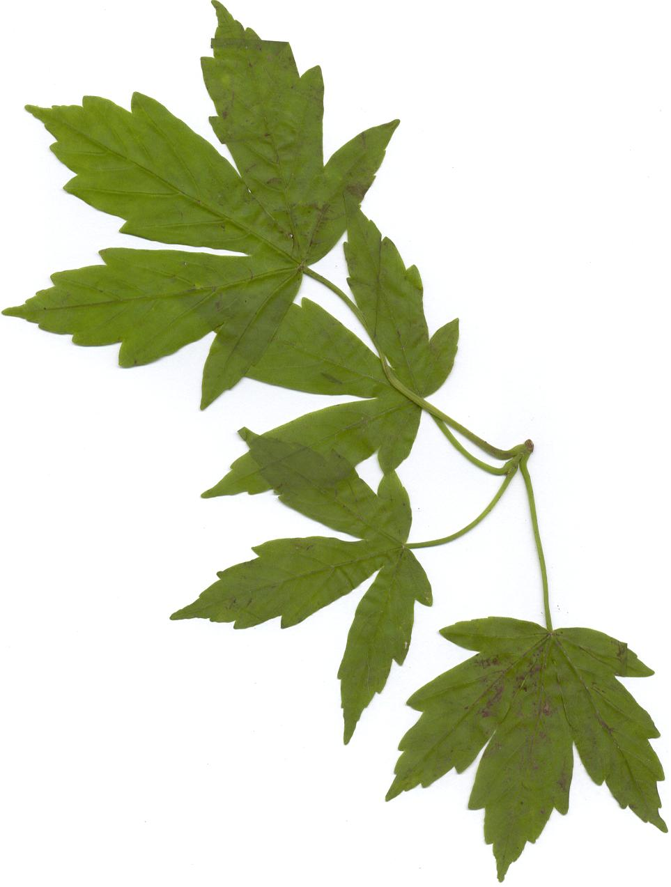 Blätter von Acer heldreichii (Original text: 06.06.2002 im Orjen herbarisiert)